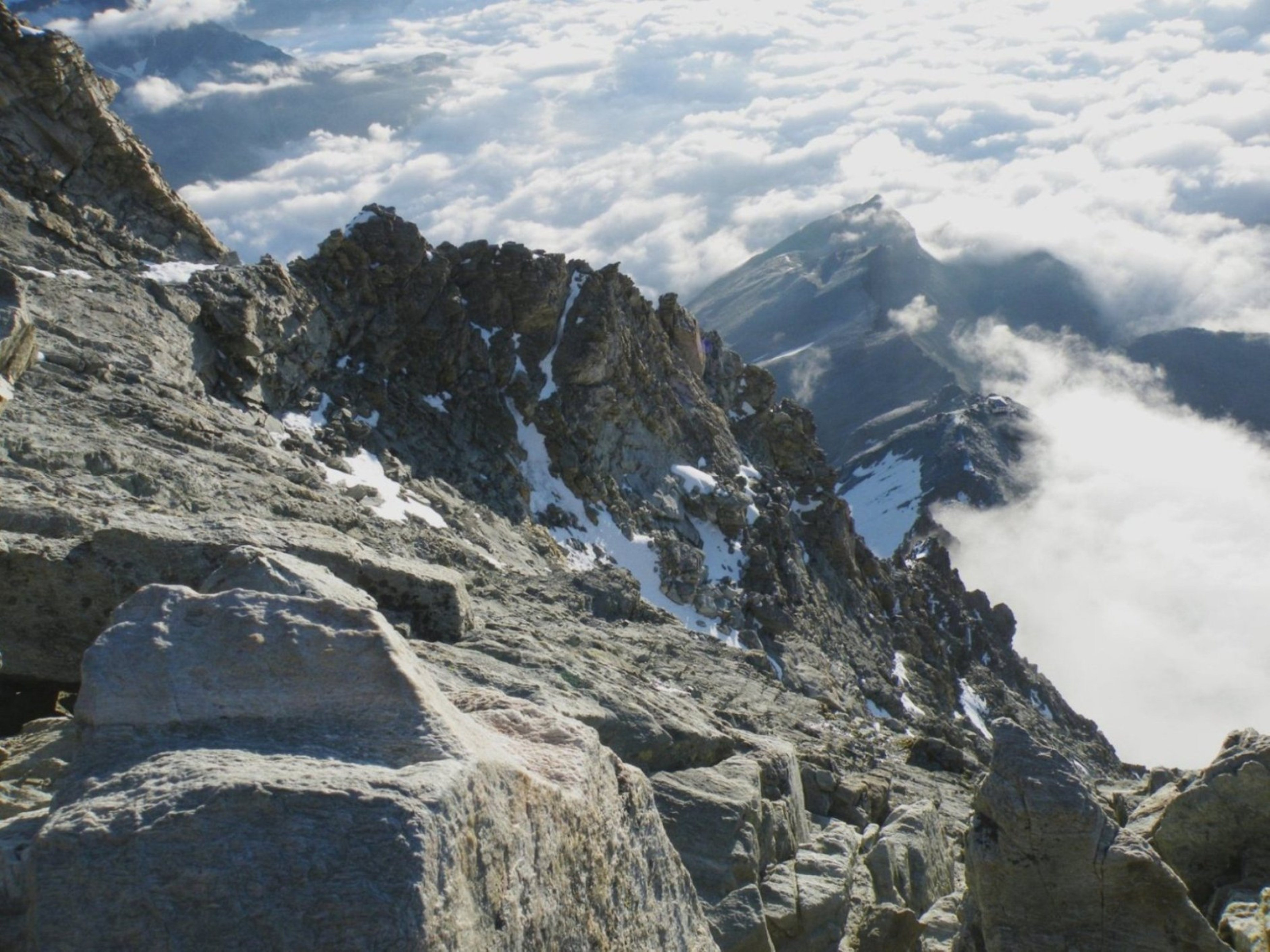 Hörnli Ridge